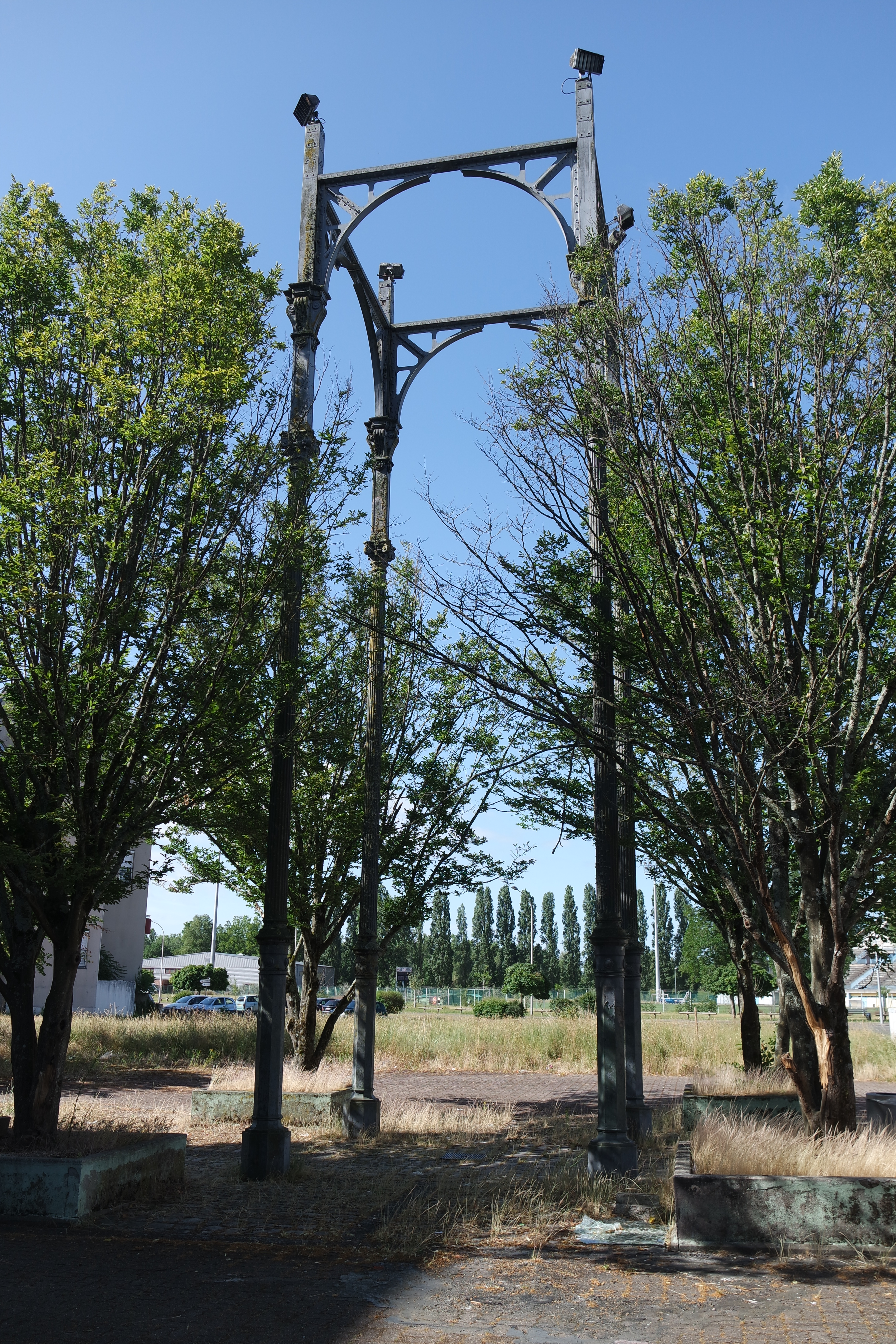 Les colonnes de fonte proviennent du démontage de l'ancien Marché Saint-Arigle. Construit en 1898, et inscrit Monument historique, il devait être remonté à l'issue des travaux entrepris qui avaient justifié son démontage. Finalement, pour en conserver le souvenir, ces quatre colonnes ont été assemblées sur cette placette des Courlis.